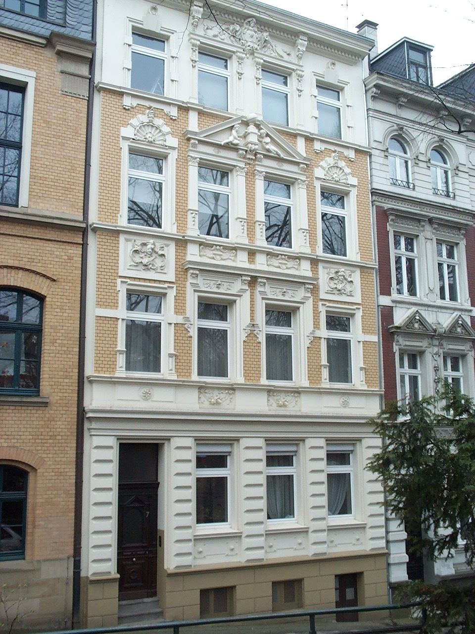 Haus Charlottenstraße 7 Anno1900, wahrscheinlich selbst fotografiert von Benutzer:Atlantafz upload on 19:07, 23. Dez 2005 . . Atlantafz . . 960 x 1280 (265047 Byte)